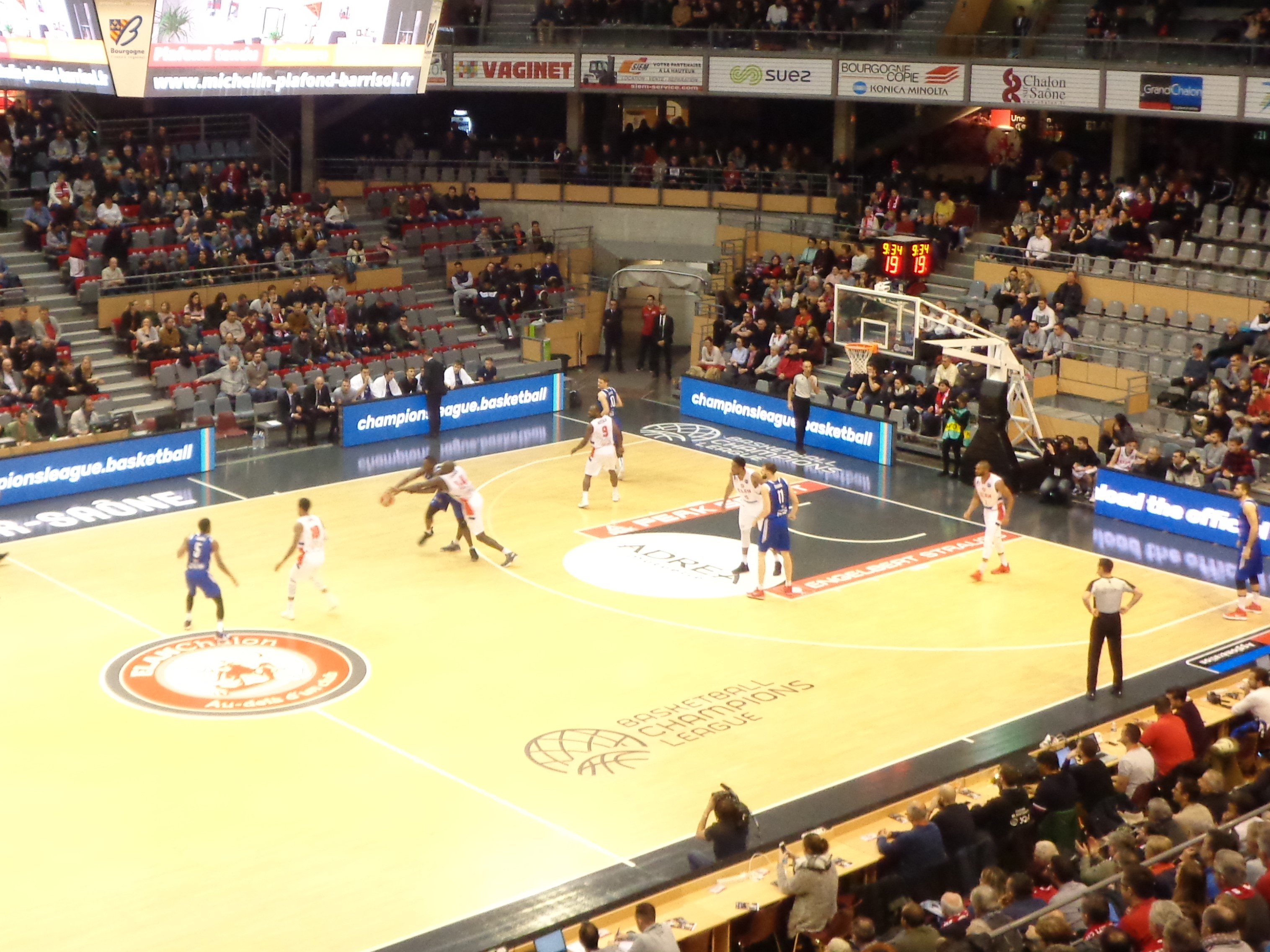 Match de Ligue des Champions de basket-ball (saison 2017-2018) entre l'Elan Chalon et Klaipėdos Neptūnas au Colisée de Chalon-sur-Saône.